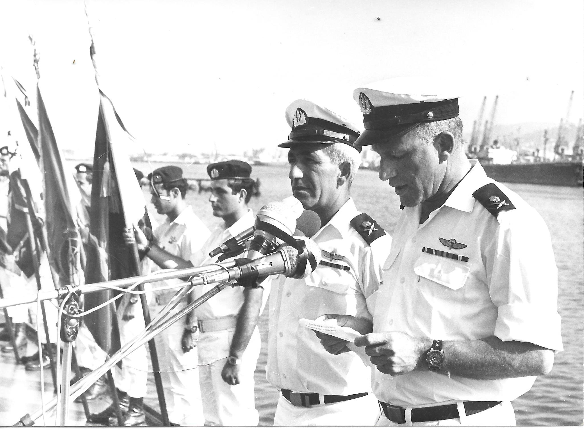 החלפת מפקדי חיל הים אברהם בוצר מוסר לבנימין תלם